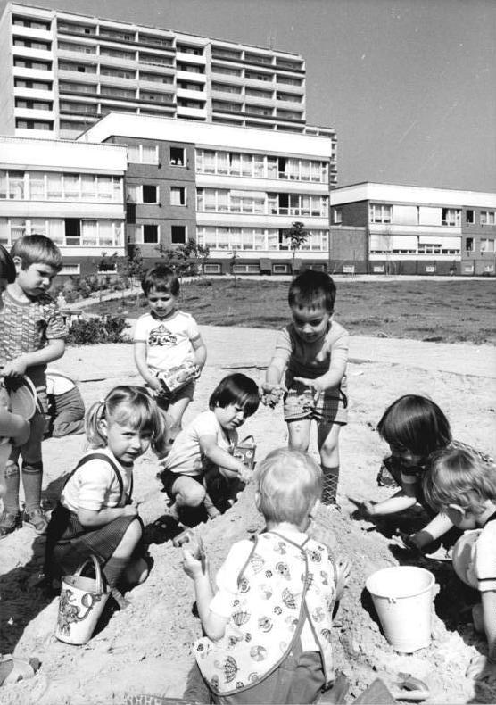 Gera, Lusan, Wohnblocks ADN-ZB Kasper 04.06.82-schl. Gera: Gut aufgehoben sind die Kleinen im Kindergarten in der Werner-Pätzold-Straße 10, wenn Mutti und Vati arbeiten. Diese Tagesstätte inmitten des Neubaugebietes Lusan ist eine von 48 kombinierten Kindereinrichtungen des Bezirkes Gera, mit insgesamt 8500 Plätzen.